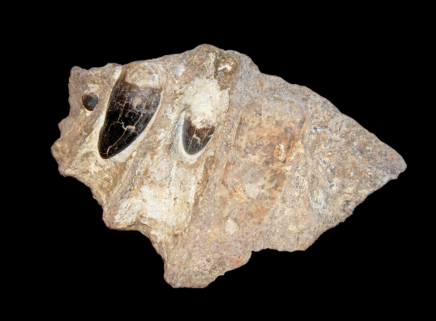 Museo civico di storia naturale Milano